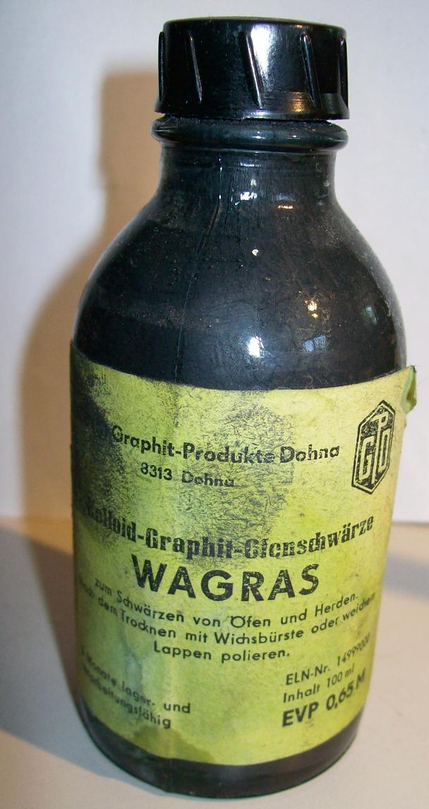 WAGRAS Ofenschwärze